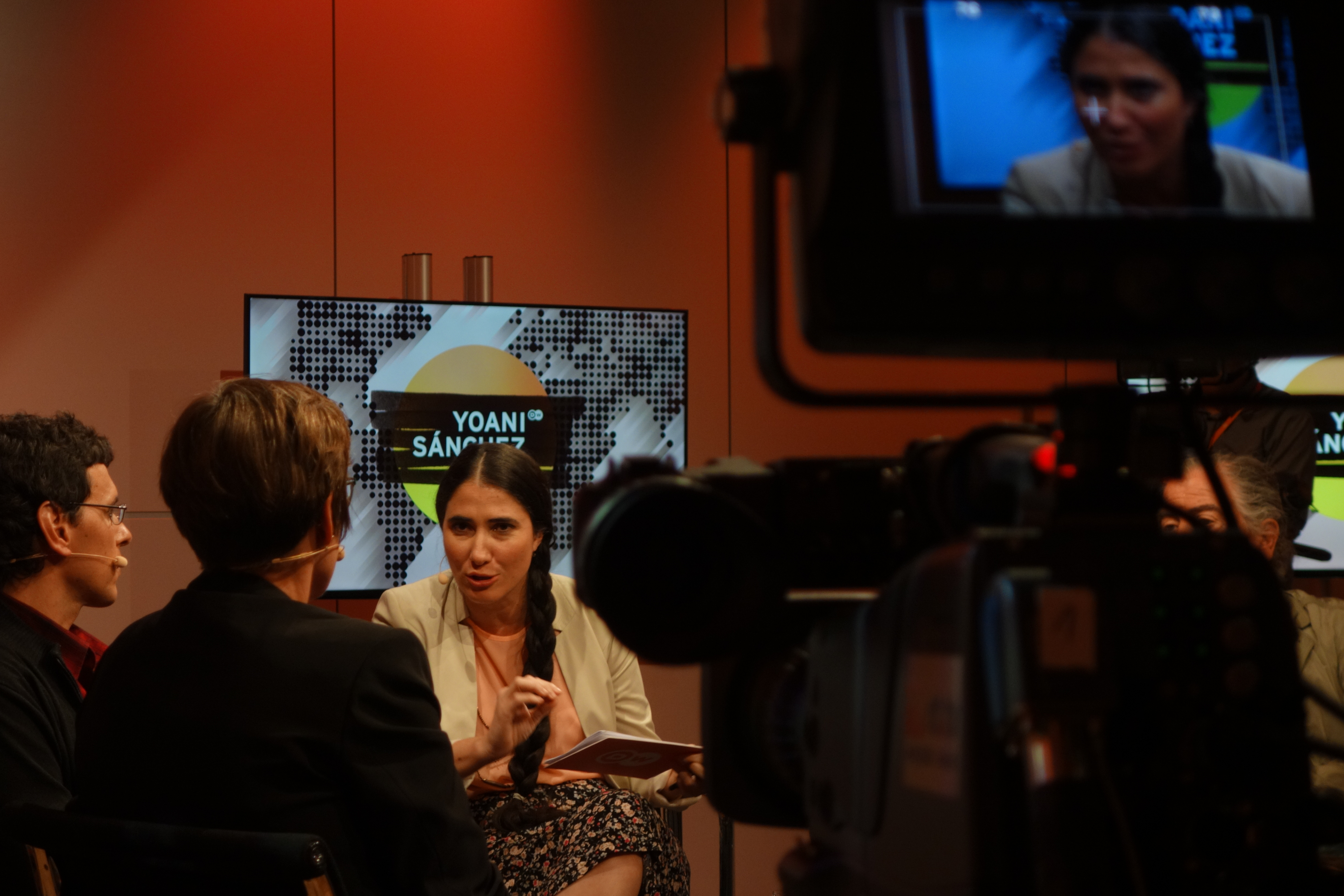 Yoani Sánchez mit Gästen während einer Aufzeichnung ihrer Fernseh-Talkshow